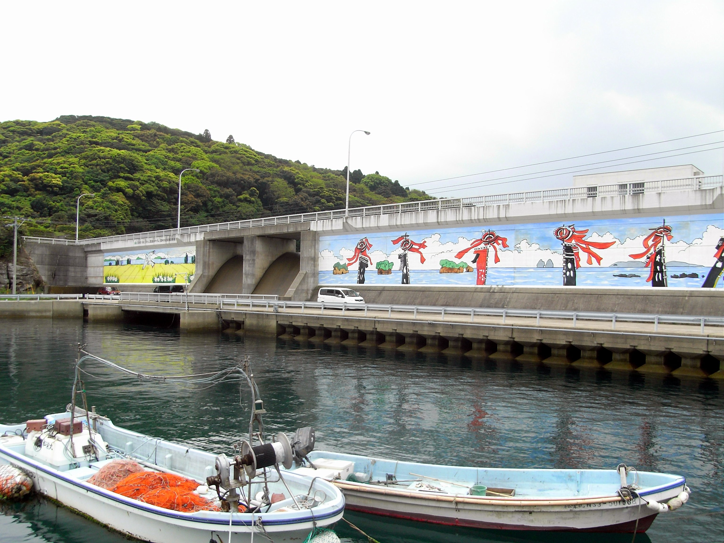 鷹島海中ダム（長崎県・鷹島）